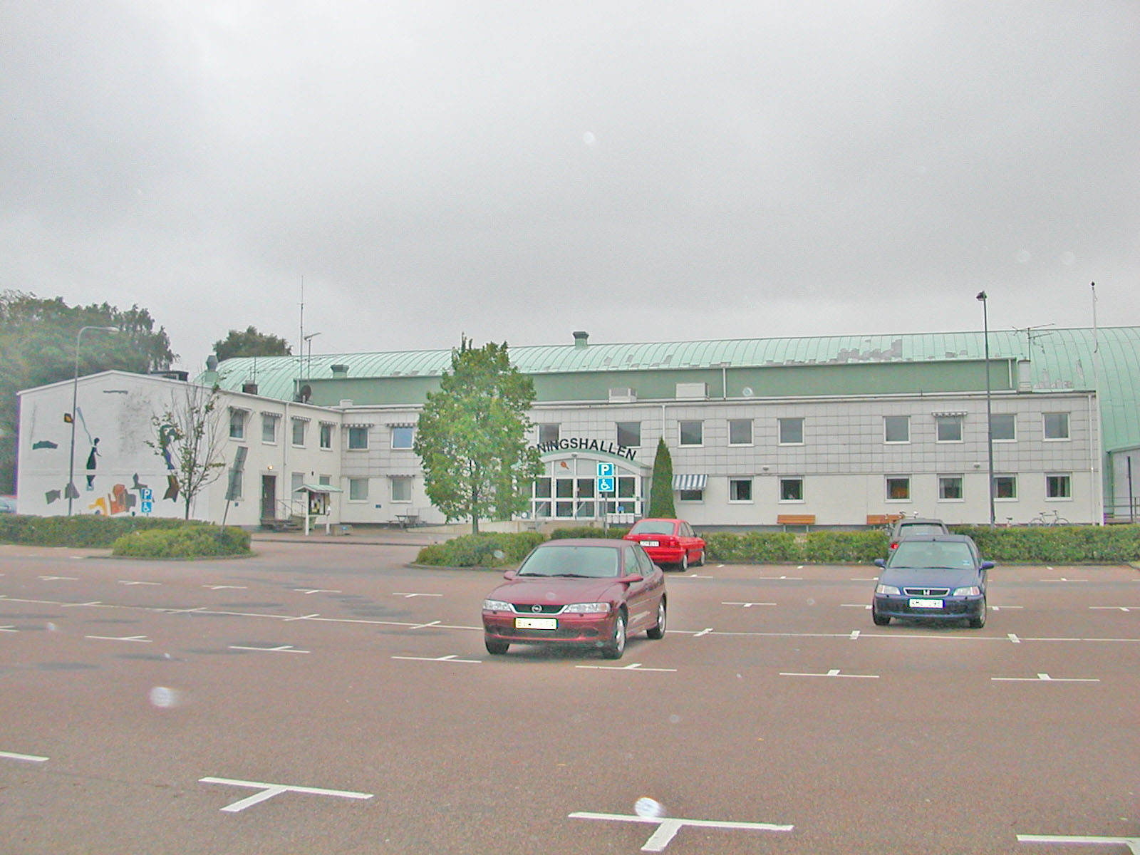 Photo of Visningshallen, Falkenberg, Sweden, 2004